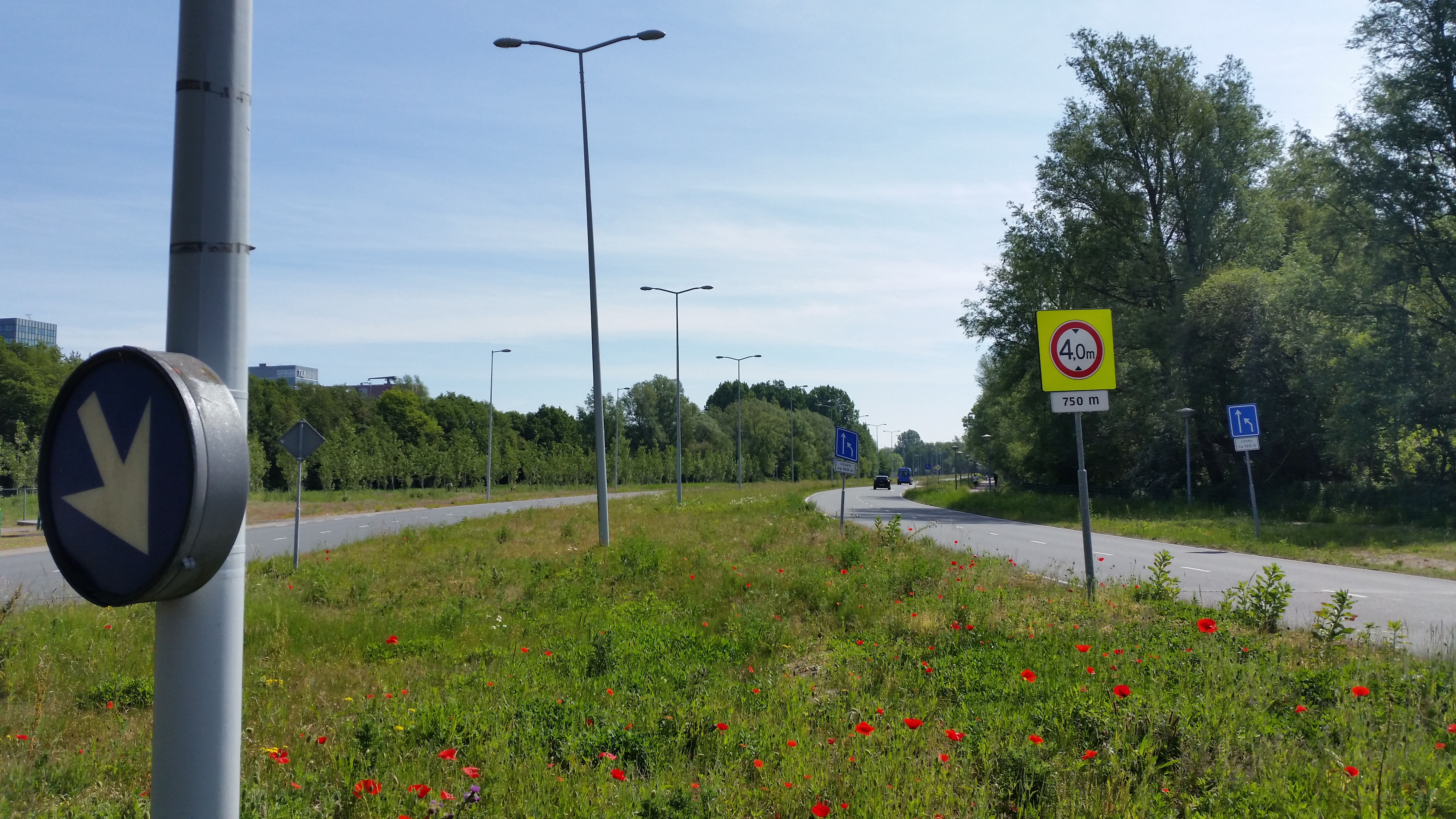 Oude Haagseweg in Amsterdam, gezien naar de stad toe (mei 2020)